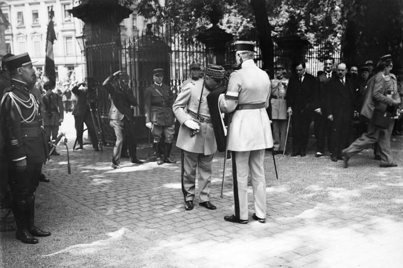 Das Rheinland ist frei! Der Abzug der letzten Franzosen aus Mainz! Der französische Ober-Kommandierende im ehemalig besetzten Gebiet General Guillaumat küsst die Trikolore nach dem Einholen vom Stadtschloss in Mainz. Information added by Wikimedia users.